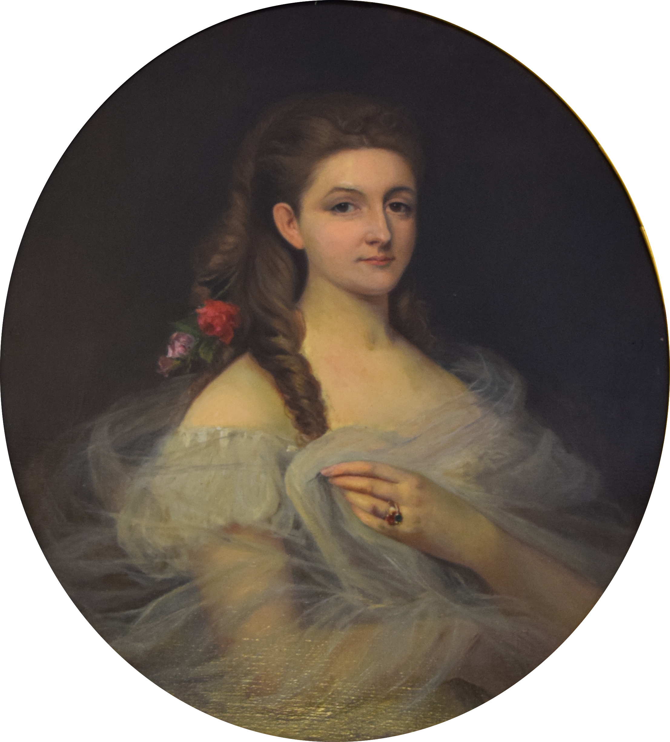 Mme Léon Chevreau, née Elisabeth Alisse (1835-1907), dame d'honneur de l'Impératrice